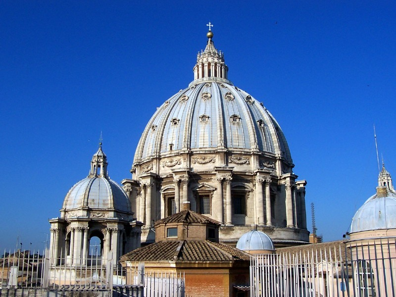 Città del Vaticano - Cupola della Basilica di S. Pietro